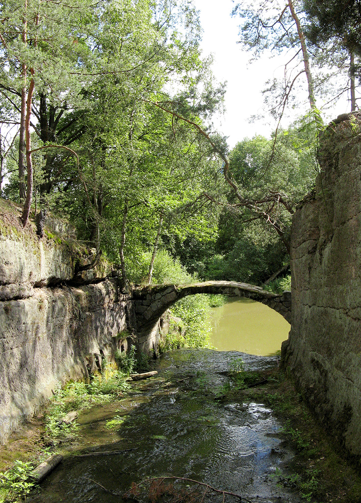 Výlet na Vlhošť a Ronov 24. 6. 2007